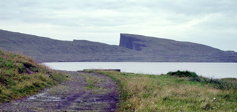 Sørvágsvatn med Trælanípa i baggrunden